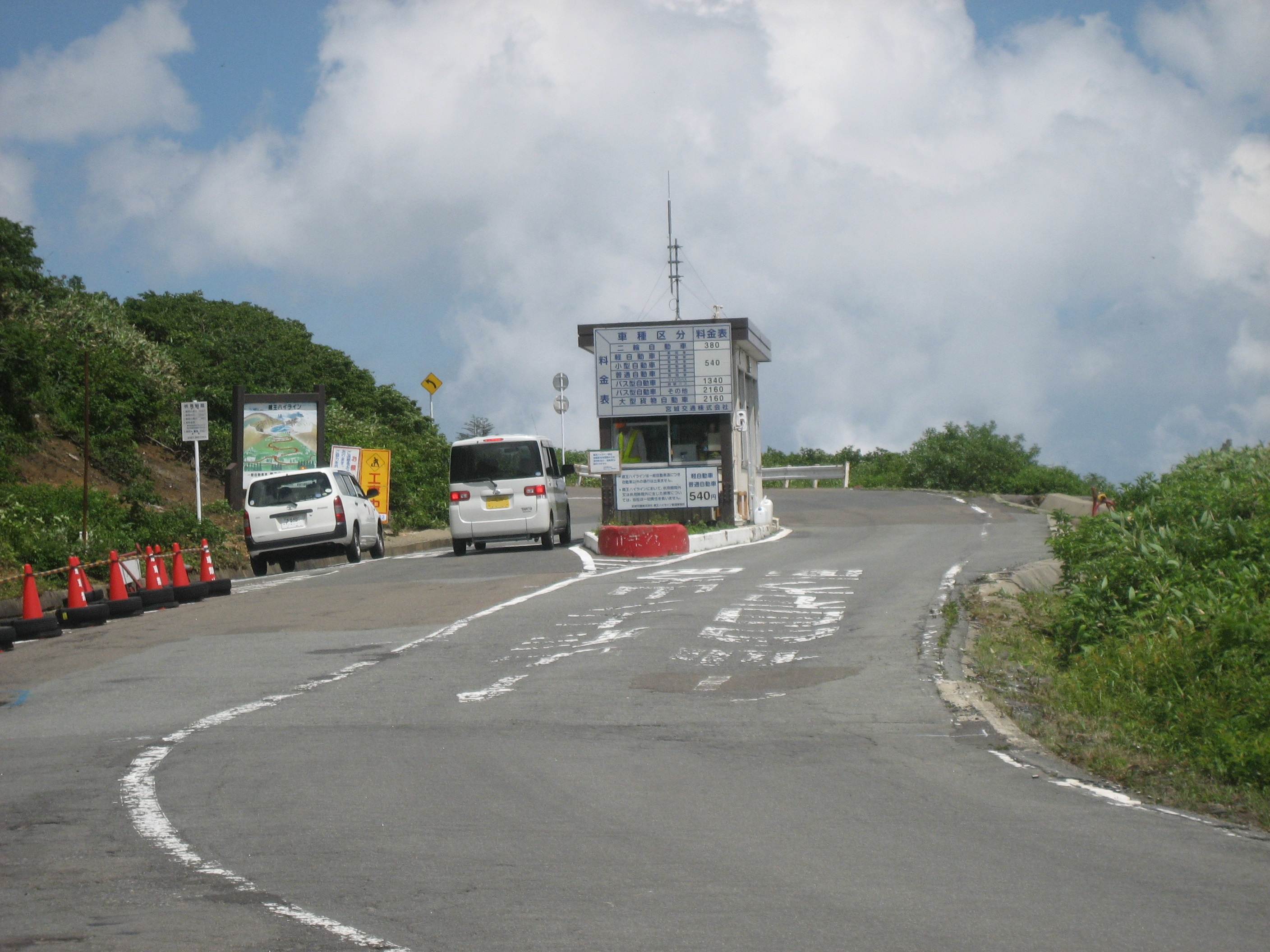 宮城県蔵王町にある蔵王ハイライン料金所